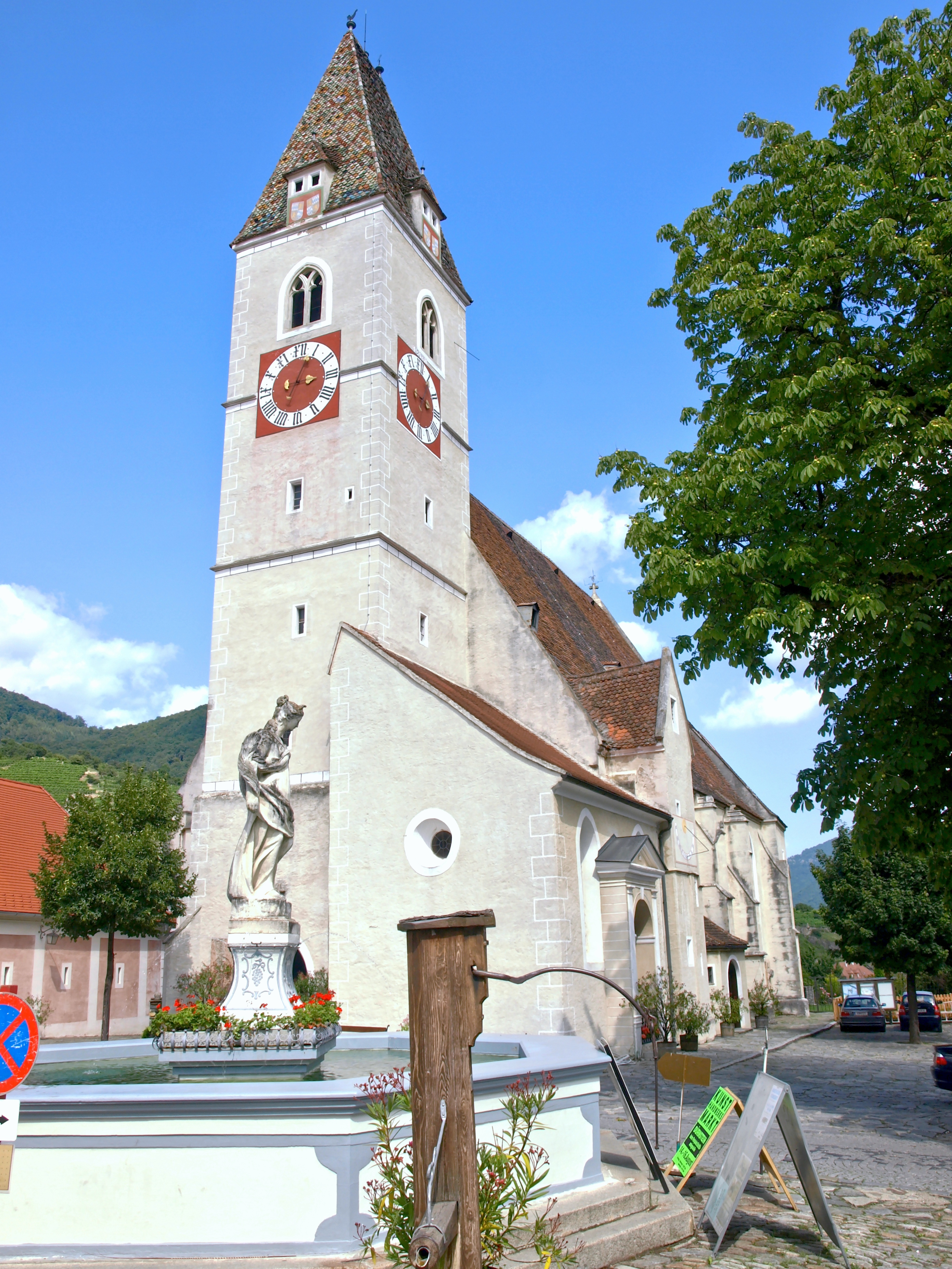 Kath. Pfarrkirche hl. Mauritius